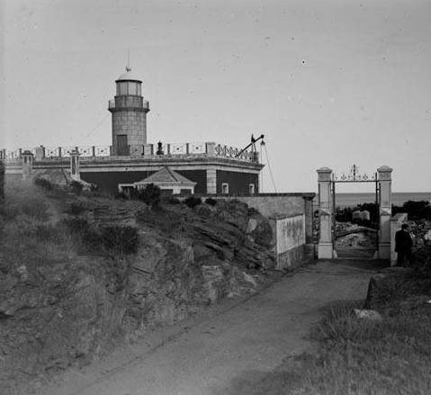 Imatge